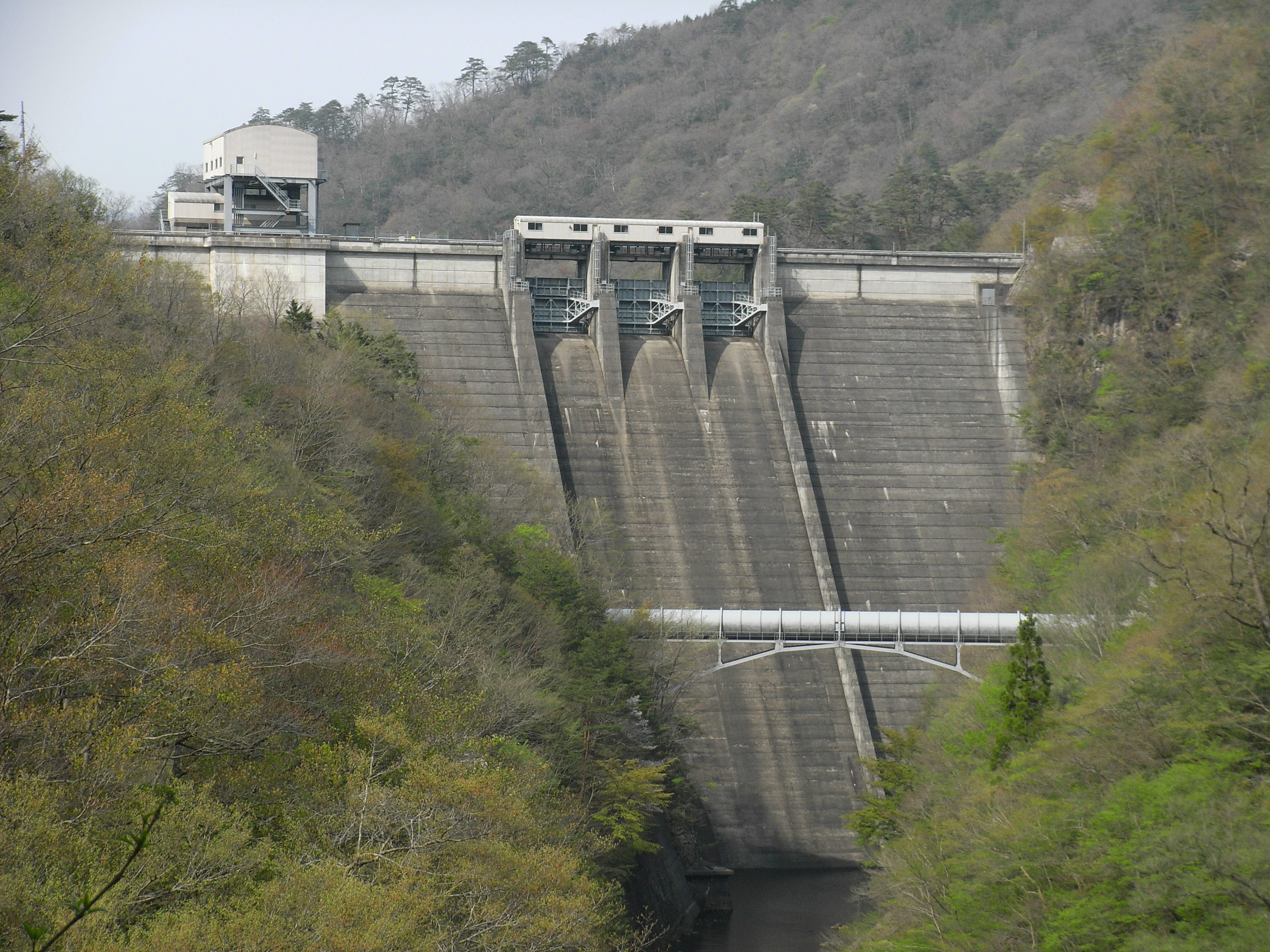 Dam